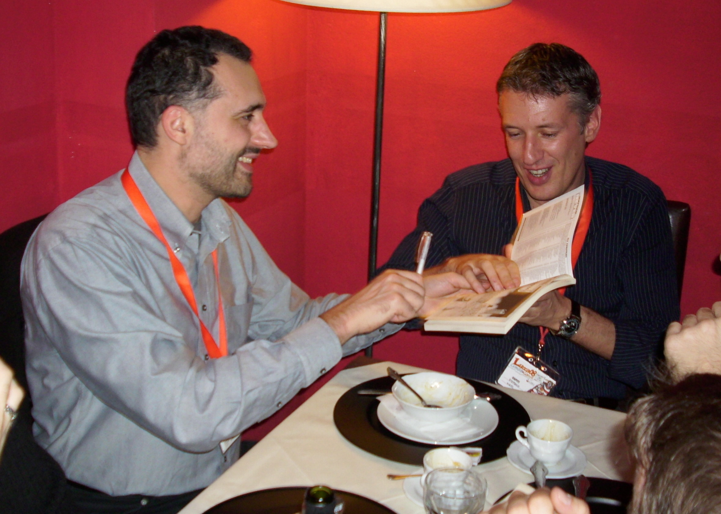 Il disegnatore Giancarlo Olivares e lo sceneggiatore Stefano Vietti, a Lucca Comics&Games 2008, intenti ad autografare un albo di Nathan Never